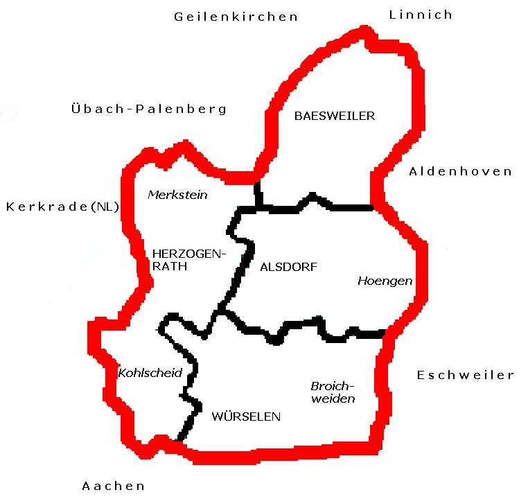 Von Benutzer:Eschweiler für Wikipedia gezeichnet, 27. Dez. 2005.